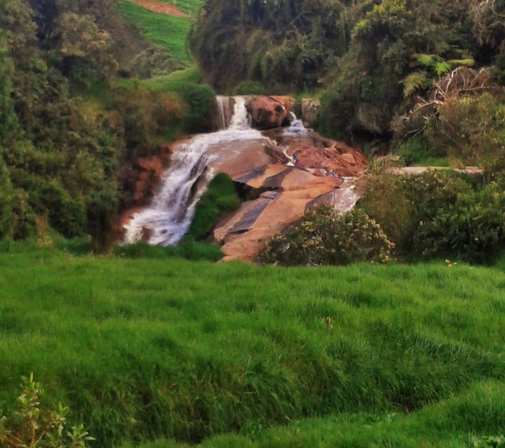 Cascada del río Guadalupe en Santa Rosa de Osos (Antioquia)